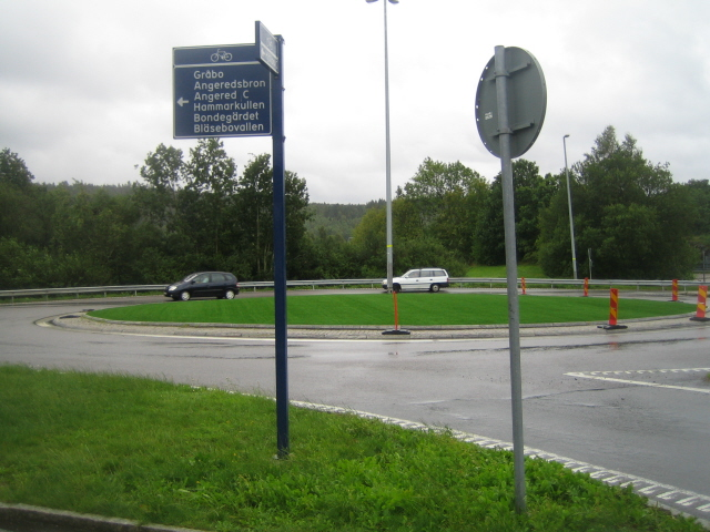 En bild på en rondell med konstgräs. Ett samarbete mellan Konstgräsexperten och Vägverket i samband med en rondell i Hjällbo utanför Göteborg.